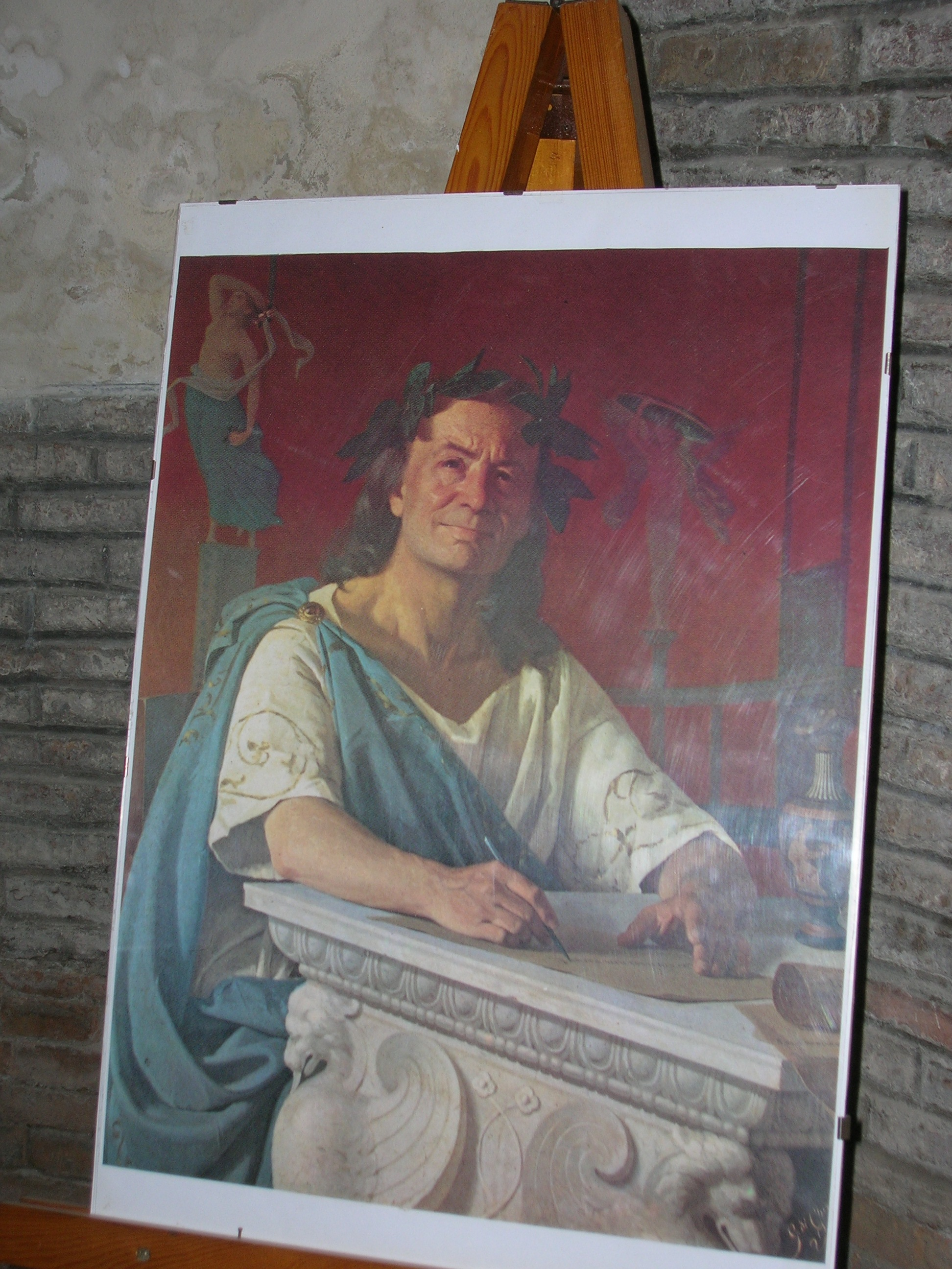 Ritratto di Orazio Flacco (Quintus Horatius Flaccus), casa di Orazio Flacco, Venosa (PZ)